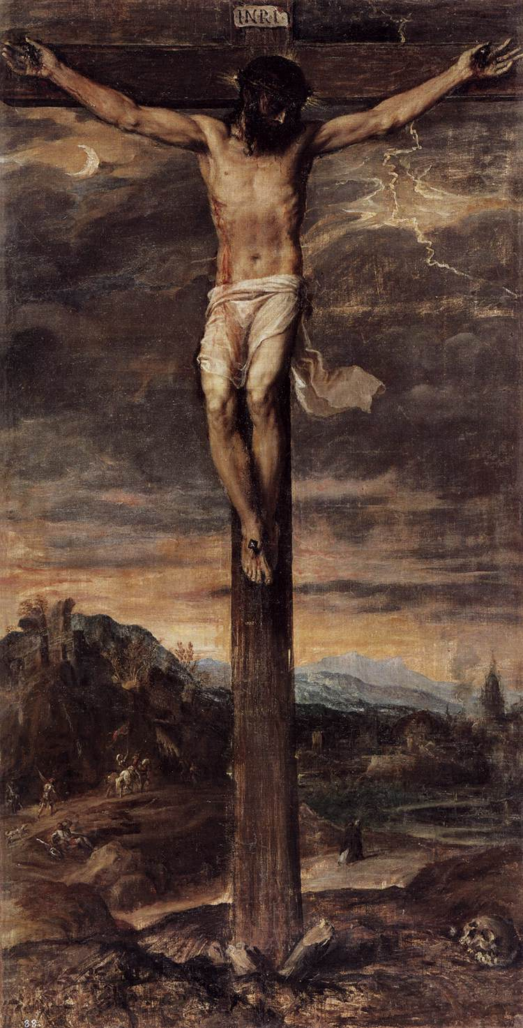 La obra representa a Jesucristo crucificado.